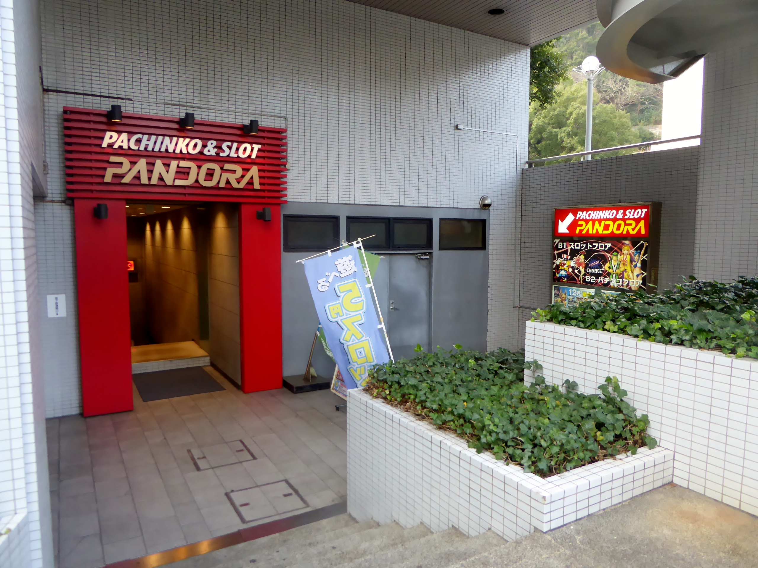 パチンコパンドラ新神戸店を撮影。